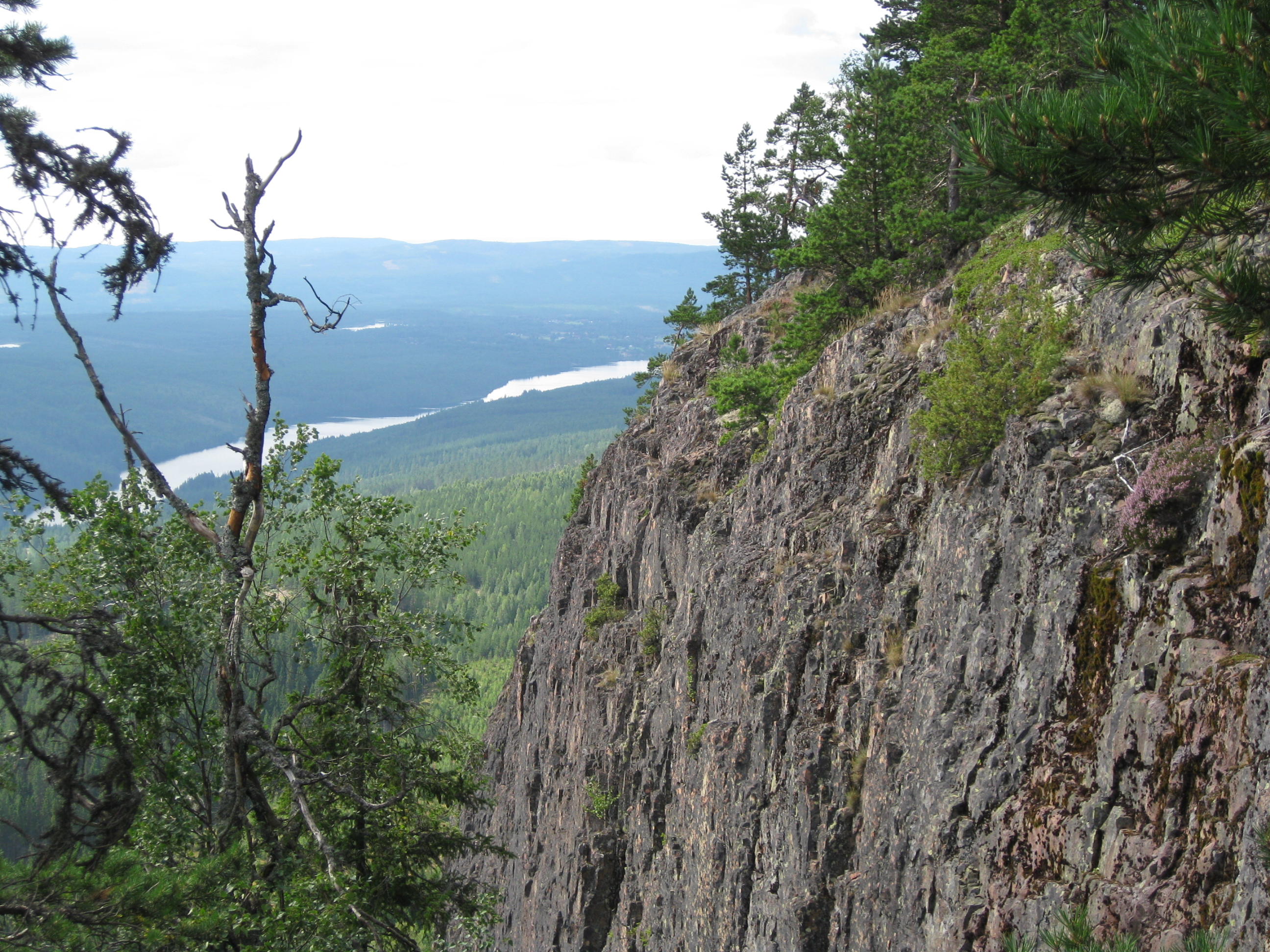 Utsikt från Hykjeberg.